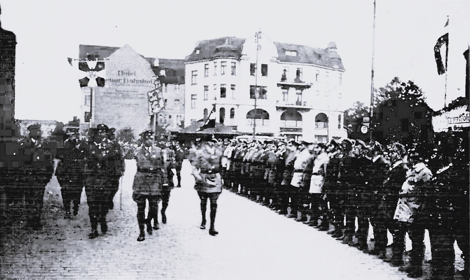 Bundesführer F. Seldte nimmt vor dem Bahnhof die Front der Ehrenkompanie ab.